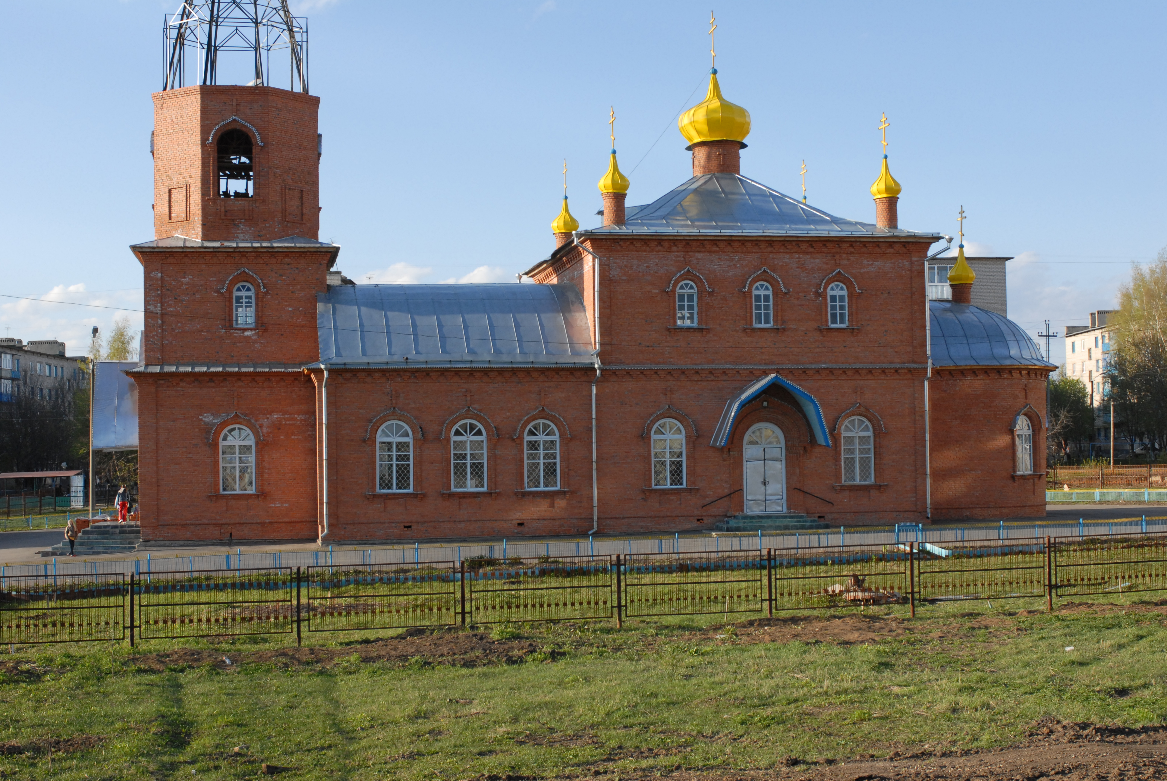 Новая церковь в Канаше